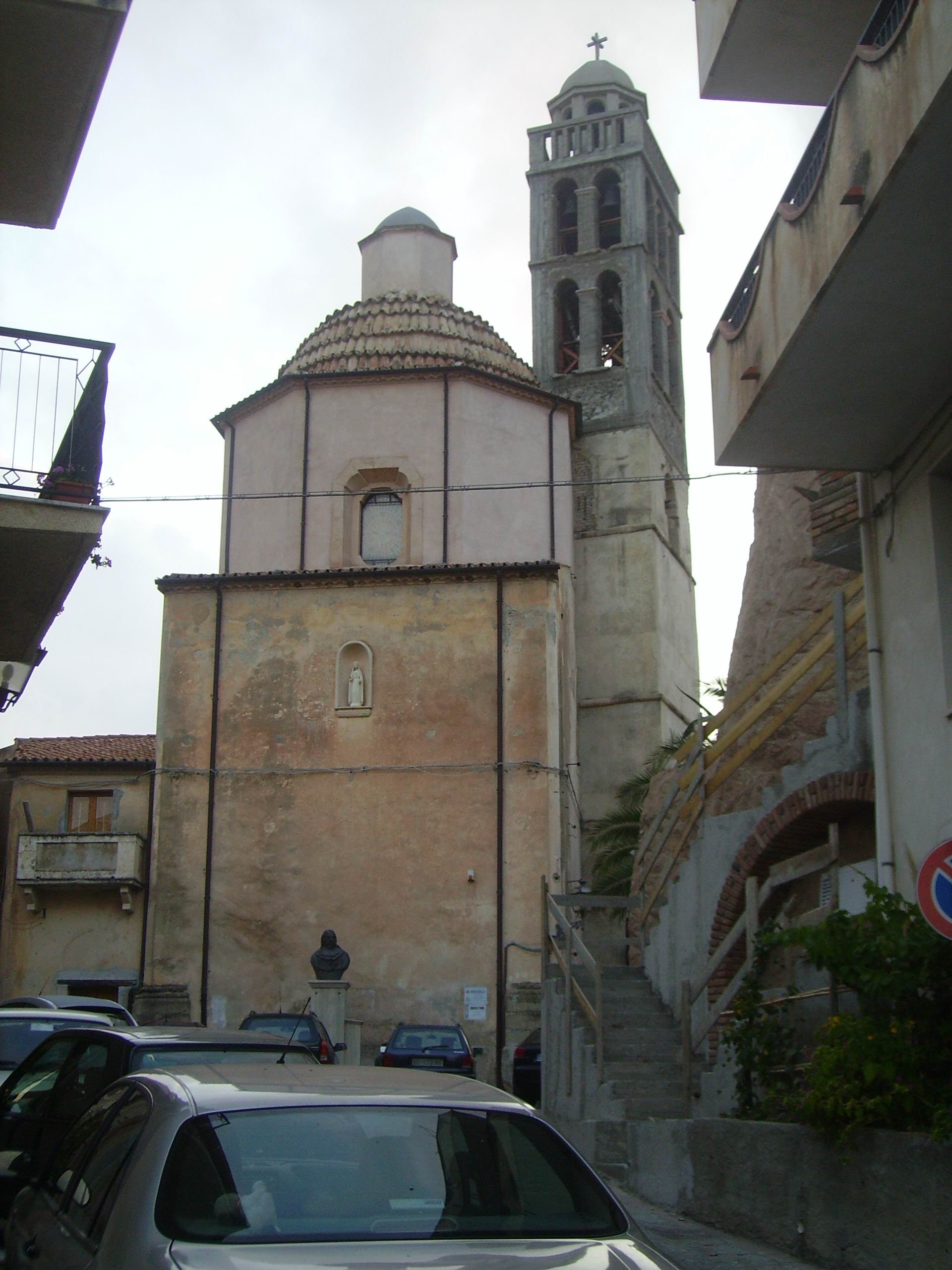 Retro della Collegiata dell'Assunta